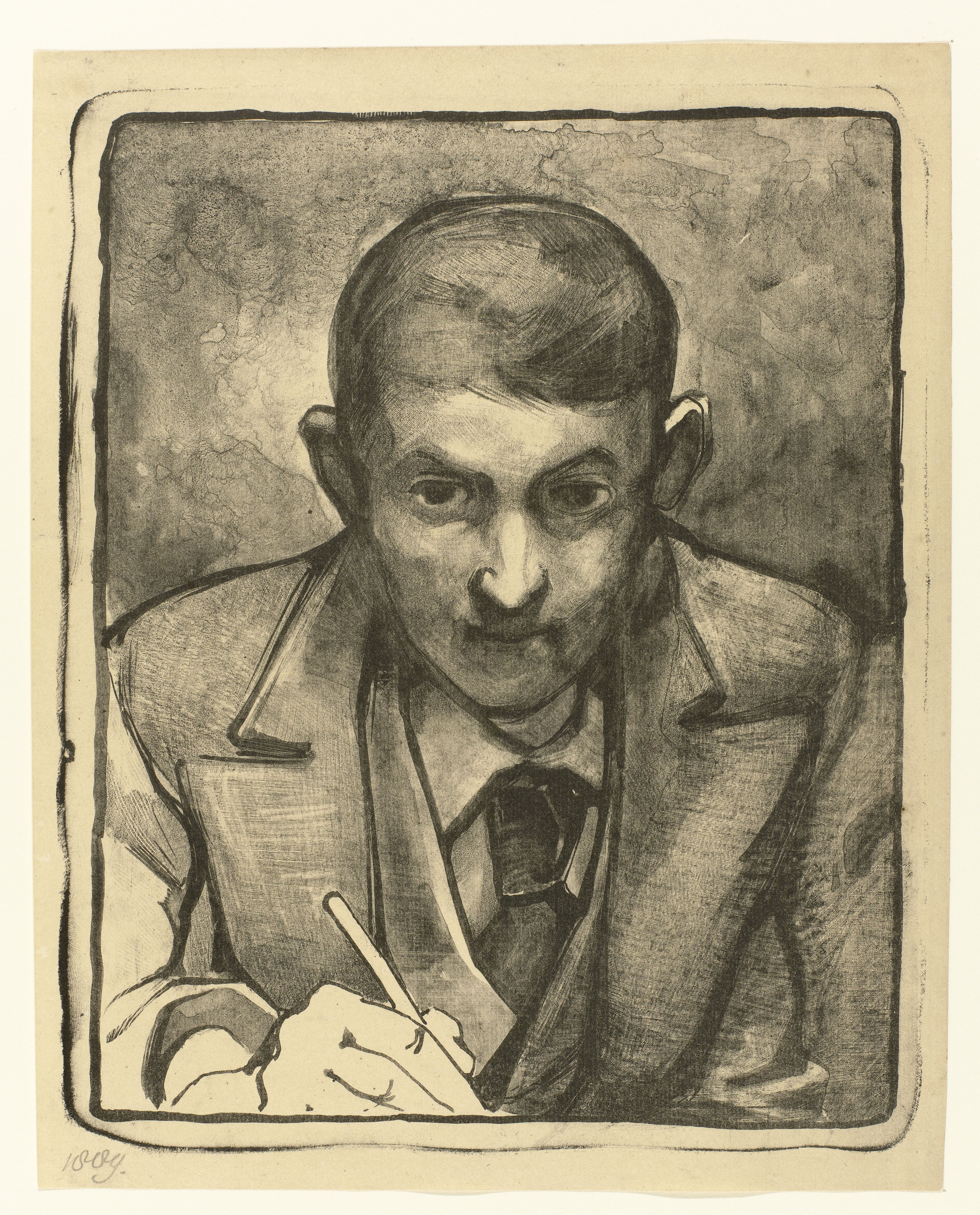 Zelfportret van prentmaker: Bernard Willem (Ben) Wierink 1866 - 1939